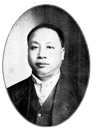 中文（台灣）: 中華民國國會議員